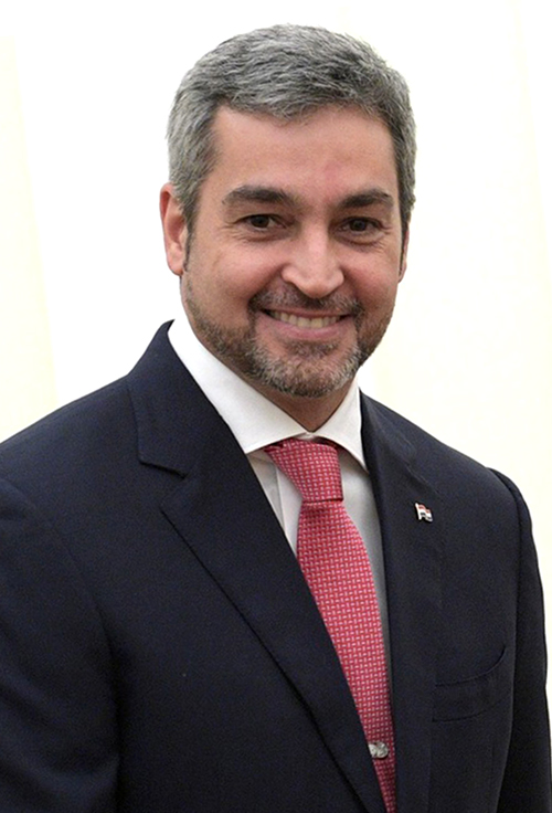 Избранный Президент Парагвая Марио Абдо Бенитес во время встречи с Президентом России Владимиром Путиным